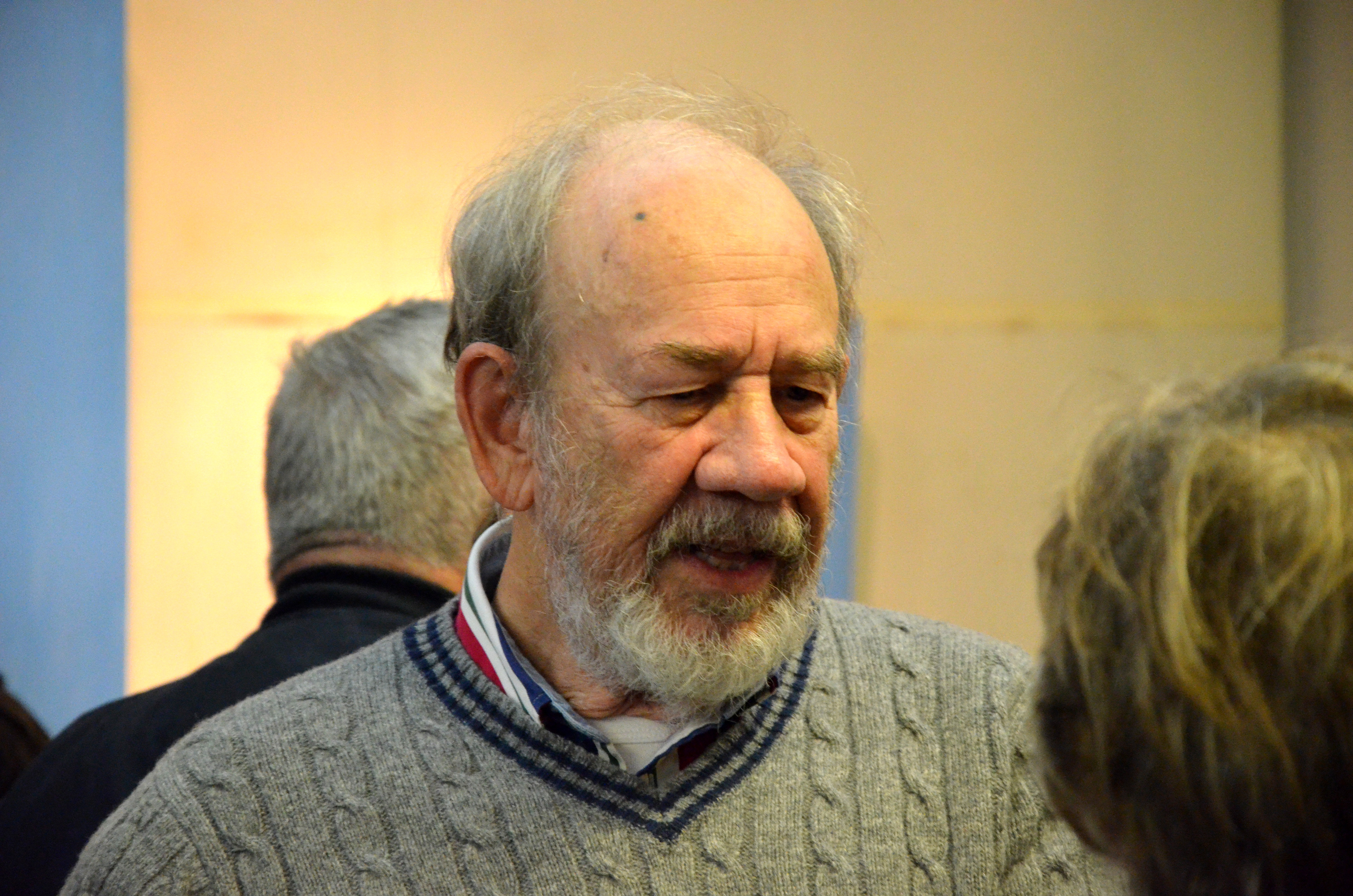 אירוע לזכרה של חנה זמר בתערוכתה של זוקי קריסטל - 'פנים'